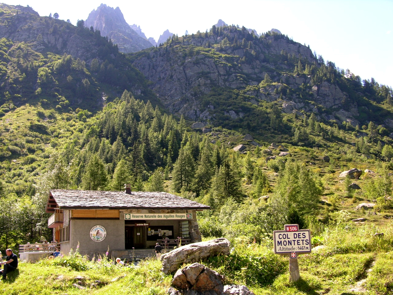 Col des Montets, France, chalet de la réserve naturelle des Aiguilles Rouges